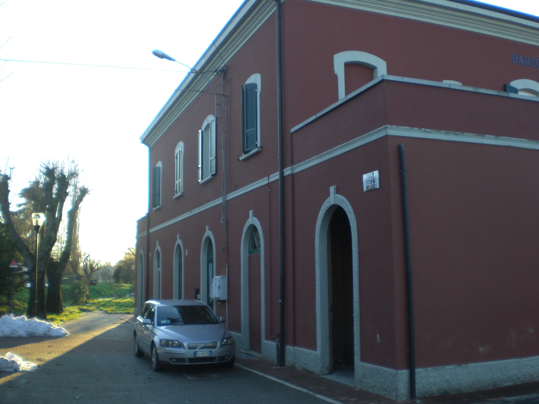 Stazione FER di Barco di Bibbiano (RE)